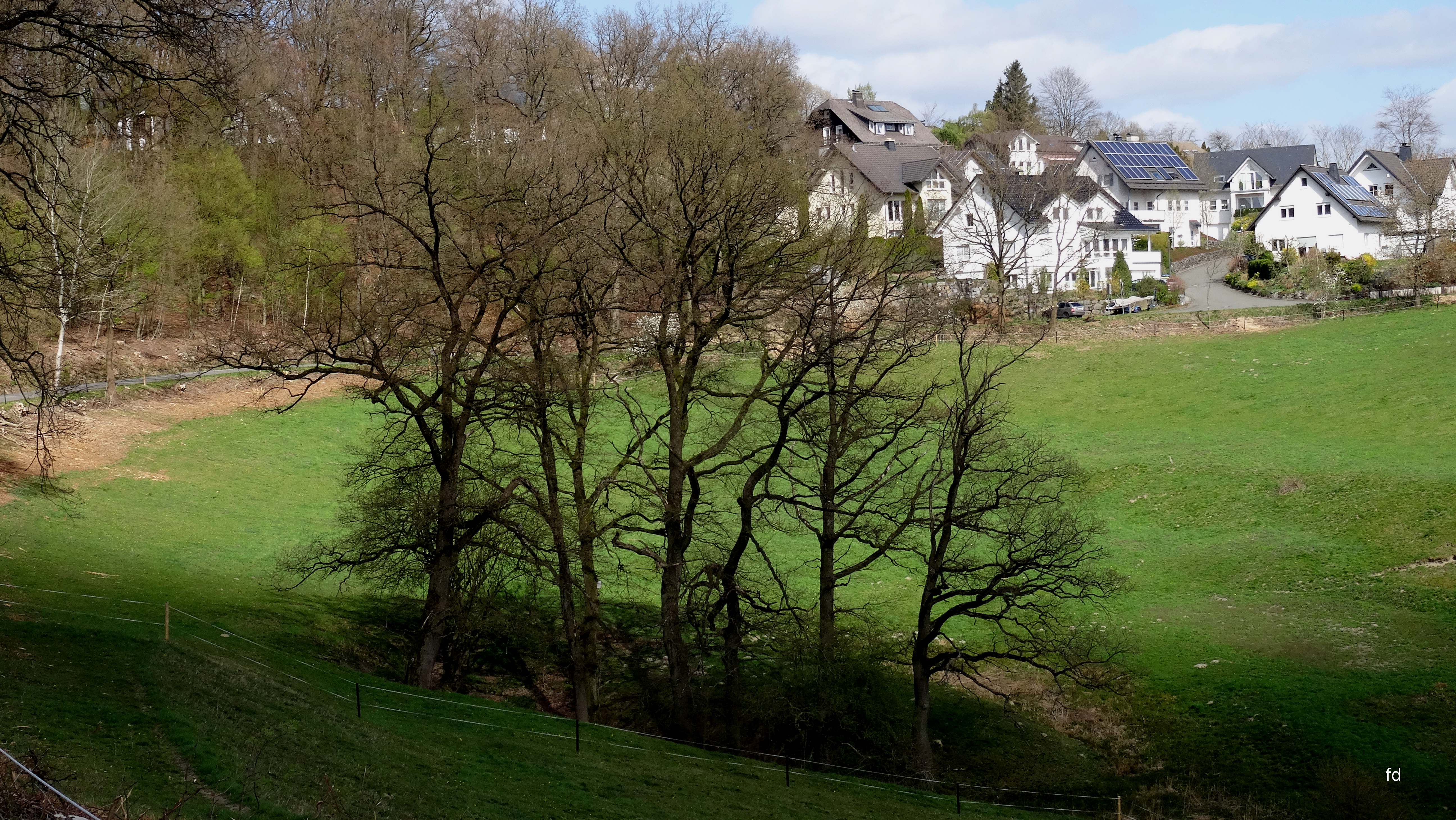 Berkey-Quellgebiet westlich von Eversberg.